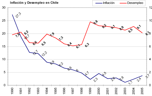 Tasas de Inflación y Desempleo en Chile Fuente: Elaboración propia en base a datos del Banco Central de Chile y el INE Chile (Instituto Nacional de Estadísticas de Chile)